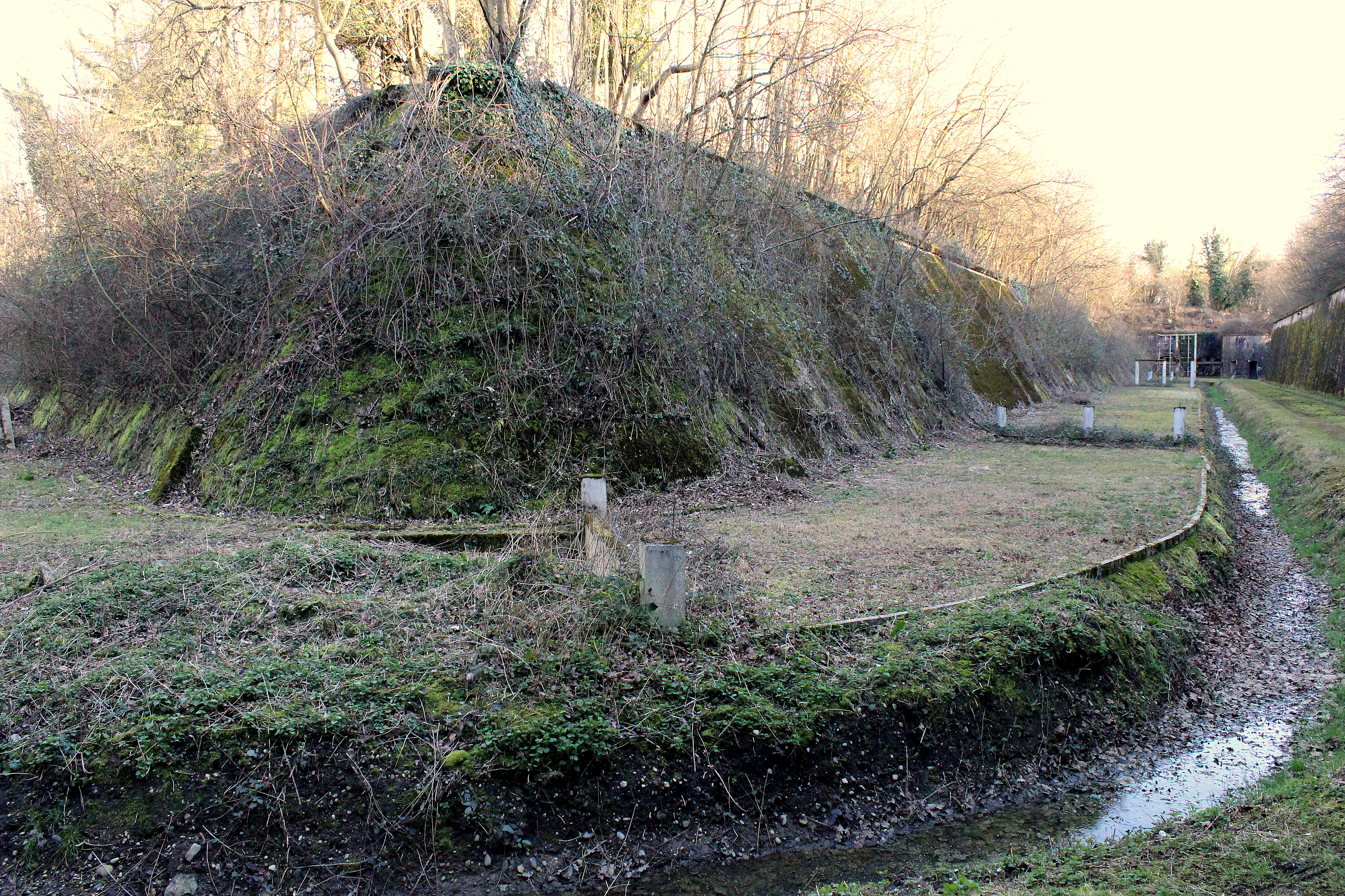 Le fort de Feyzin en 2014.